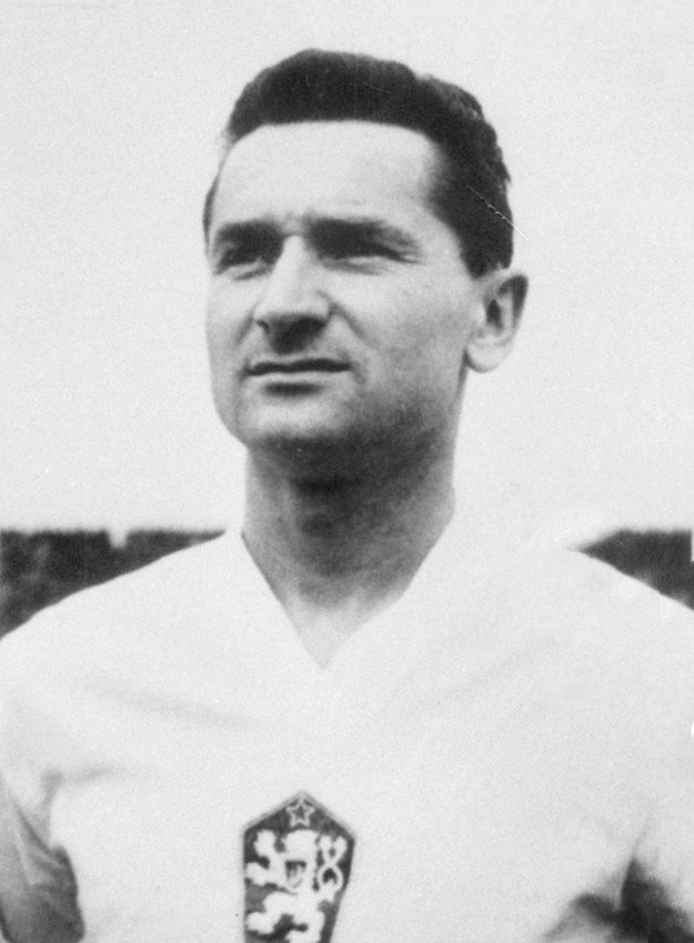 Josef Kadraba